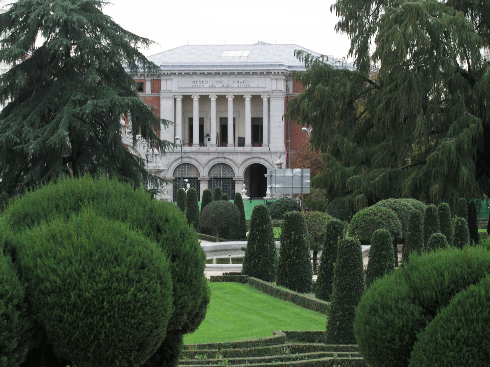 Jardines del Buen Retiro, Madrid, Spain. Casón del Buen Retiro.